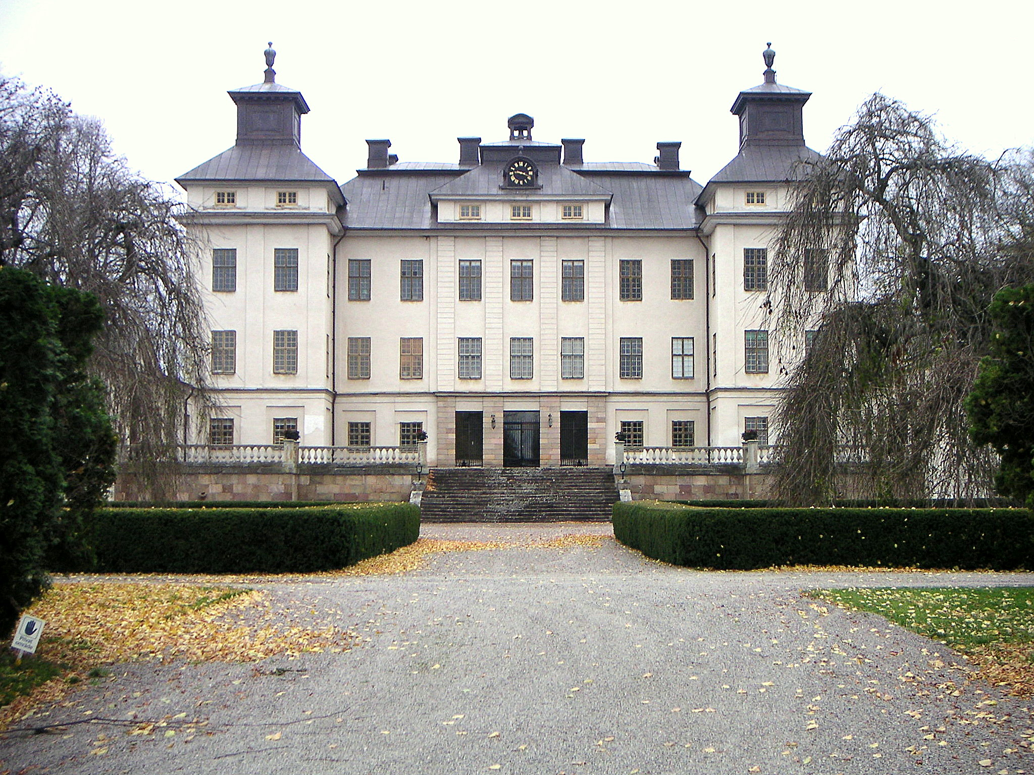 Sjöö slott